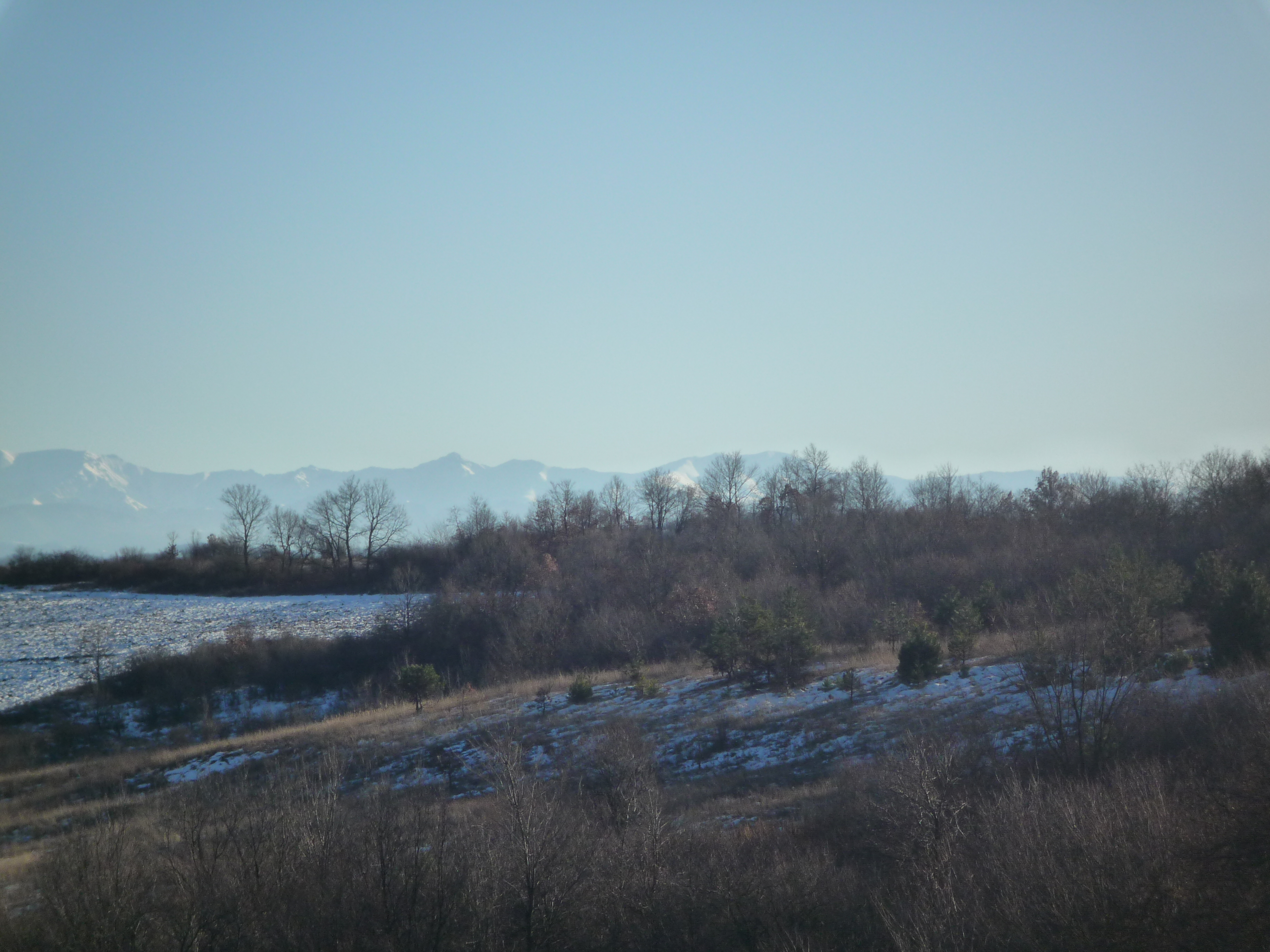 Централен Балкан/в.Купена в средата/ от с.Изворче